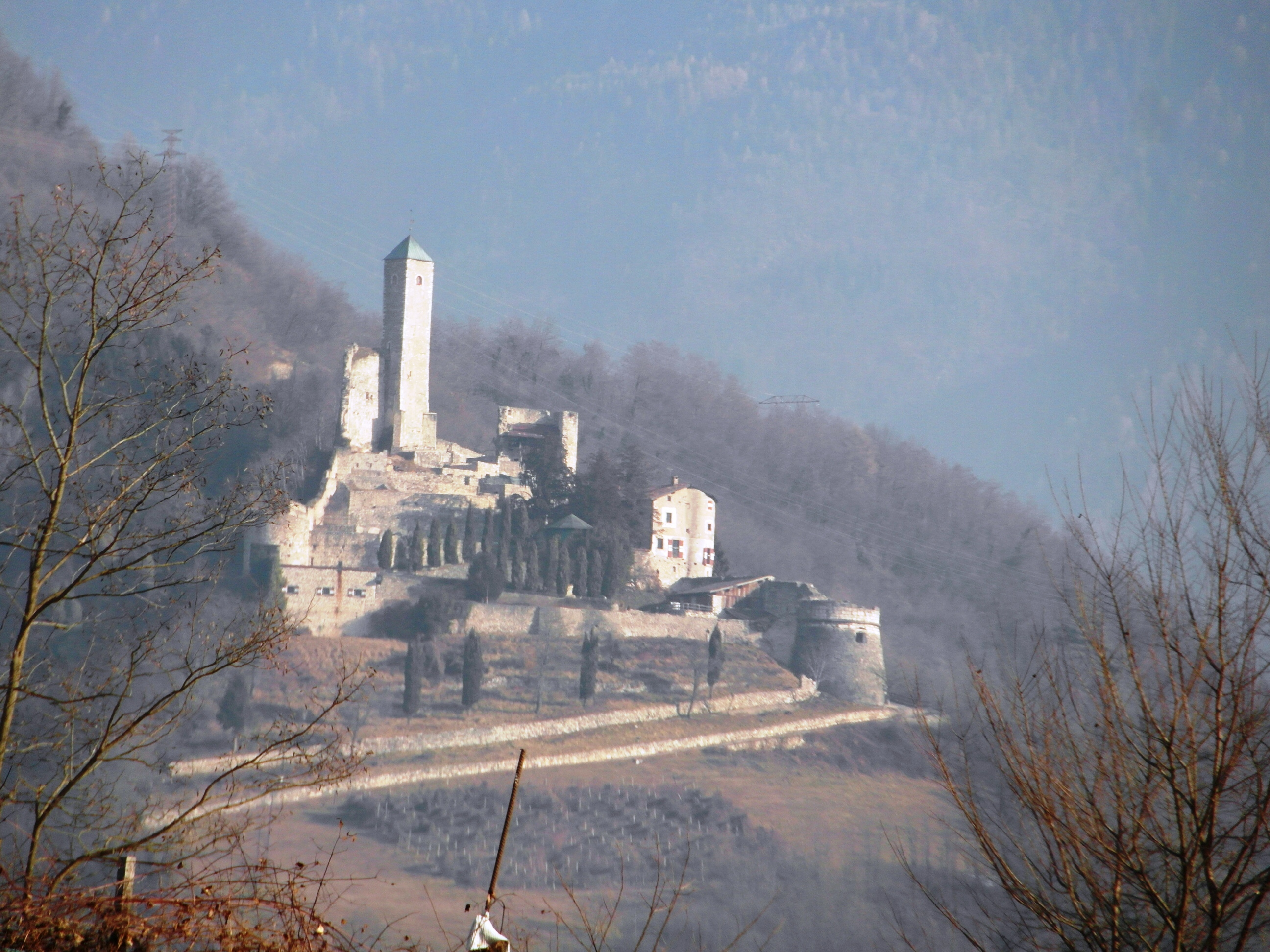 Castello Telvana di Borgo Valsugana